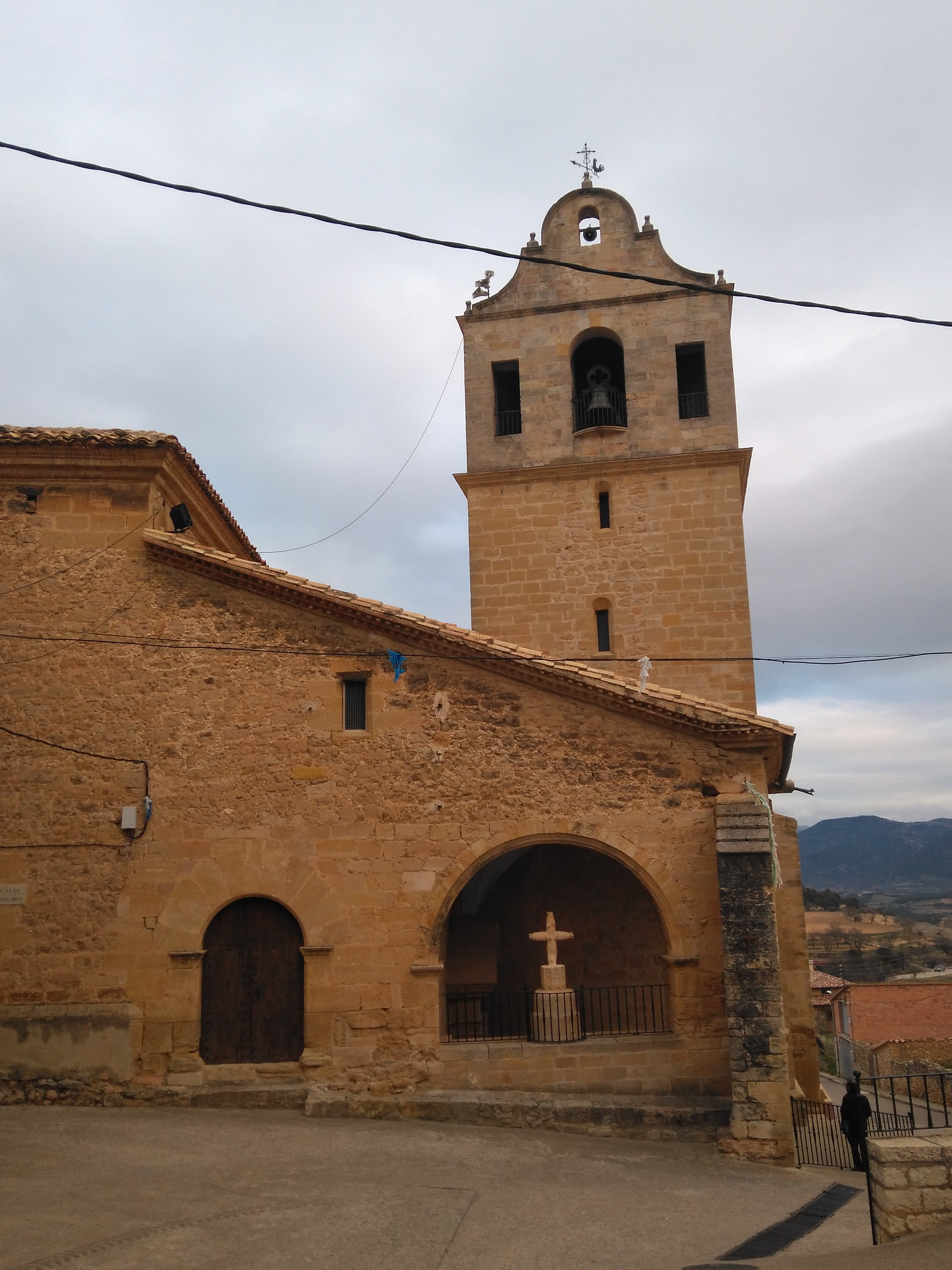 Església de l'Assumpció de Mont-roig de Tastavins